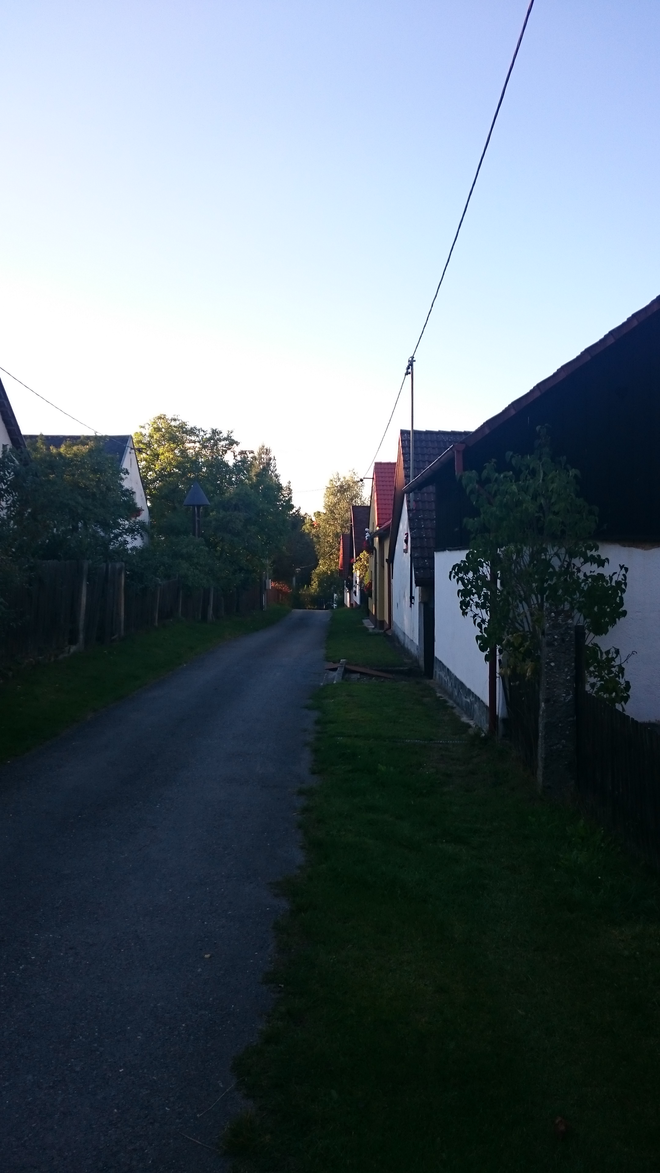 Cesta v Jedvaninách. Okres Plzeň-sever, Česká republika.